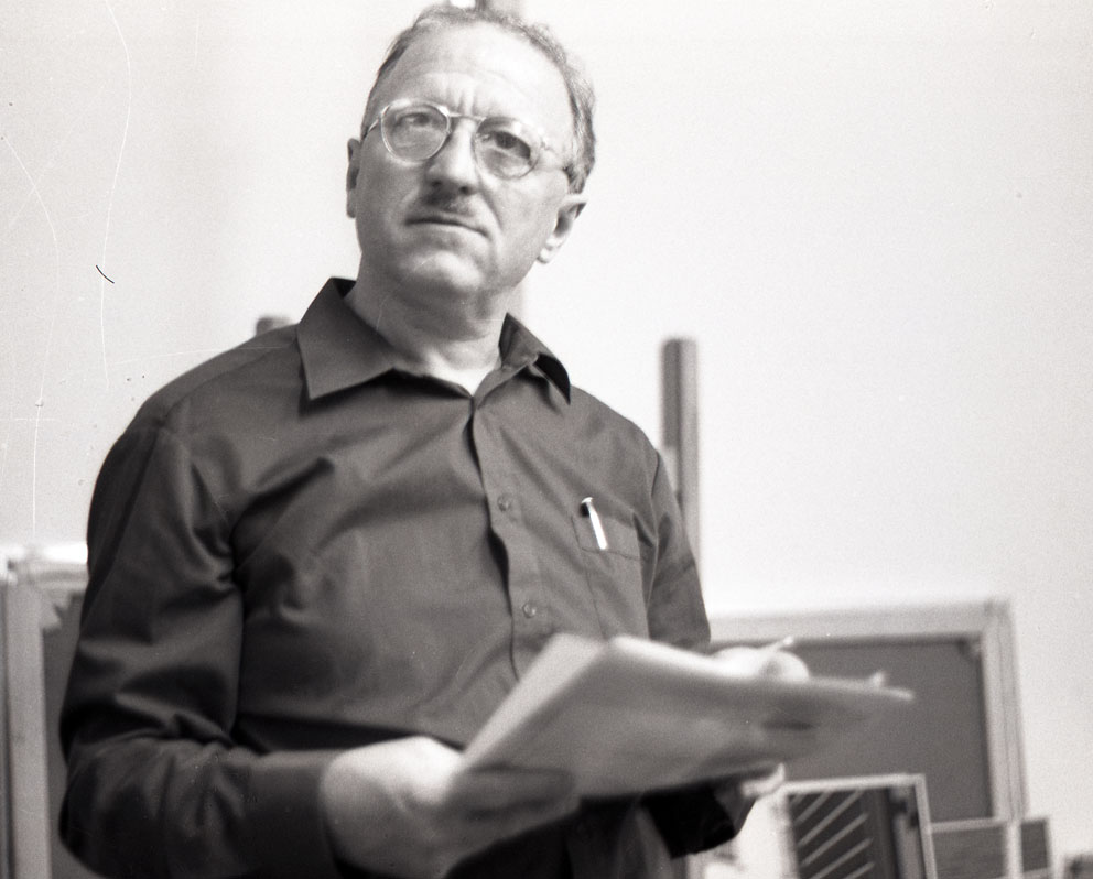 Schilder John Louis Torenbeek zoekt schilderijen uit op zijn atelier voor de volgende tentoonstelling.